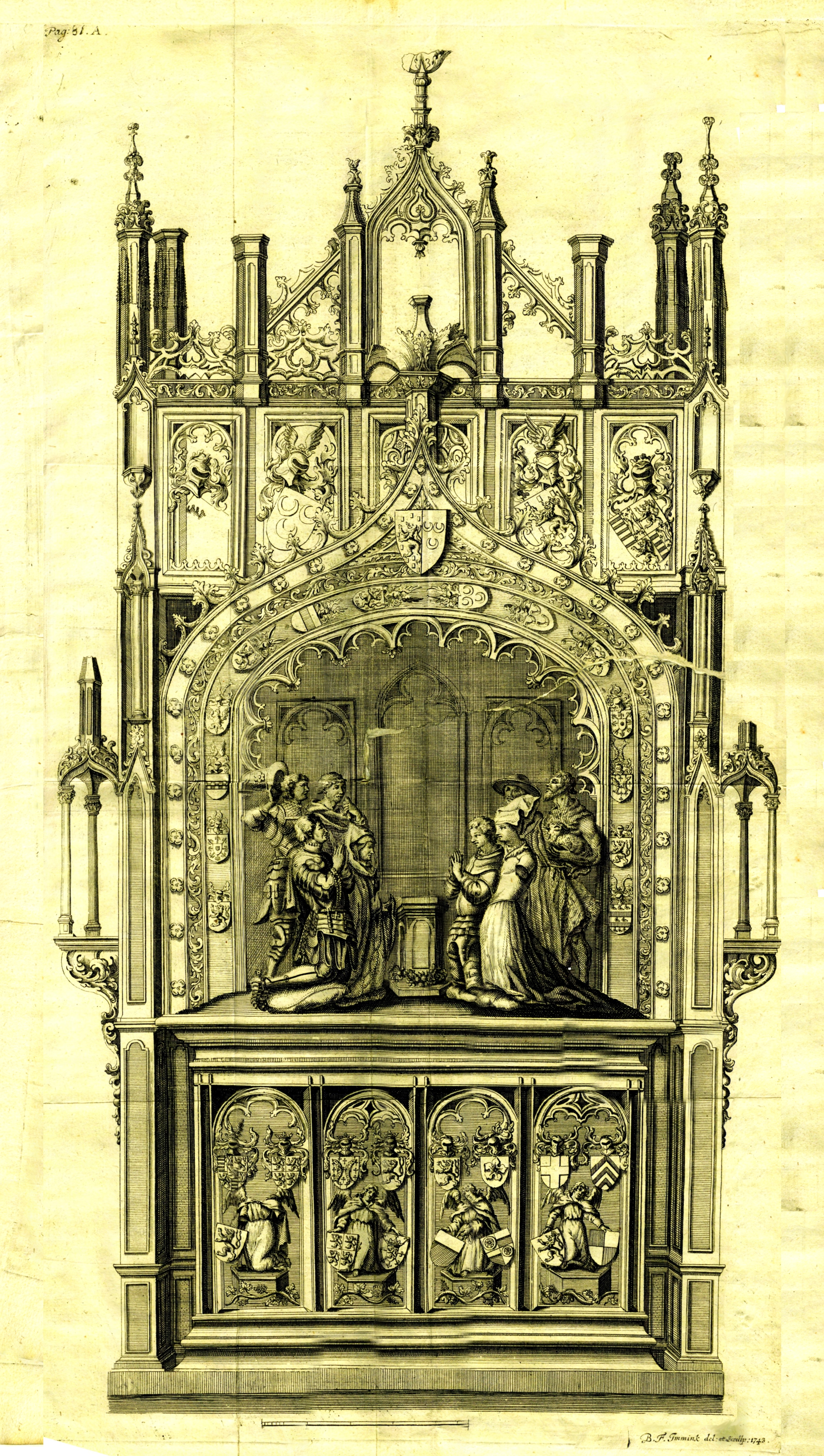 Praalgraf van Engelbrecht I van Nassau 1743 naar een gravure van B.F. Immink